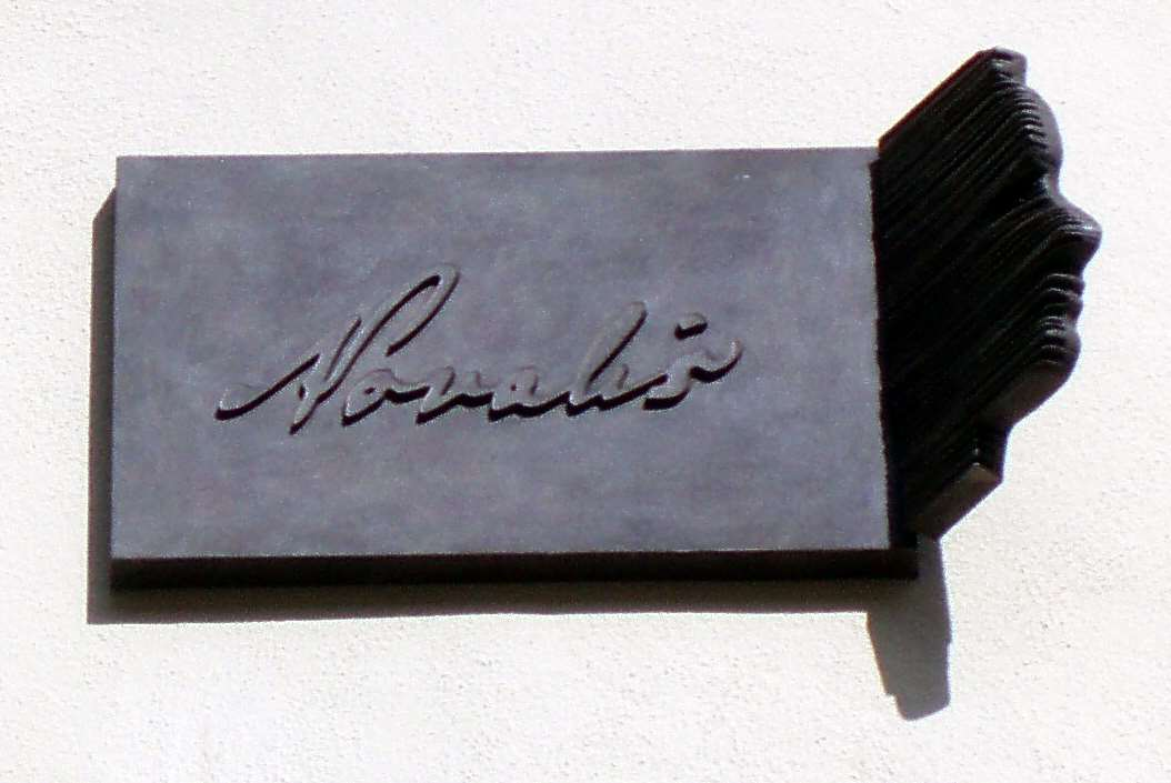 Novalis-Gedenktafel in Lutherstadt Wittenberg, gefertigt von Elisabeth Müller-Quade aus Karlsruhe